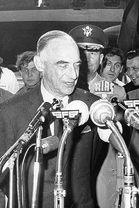 General Lucius D.Clay